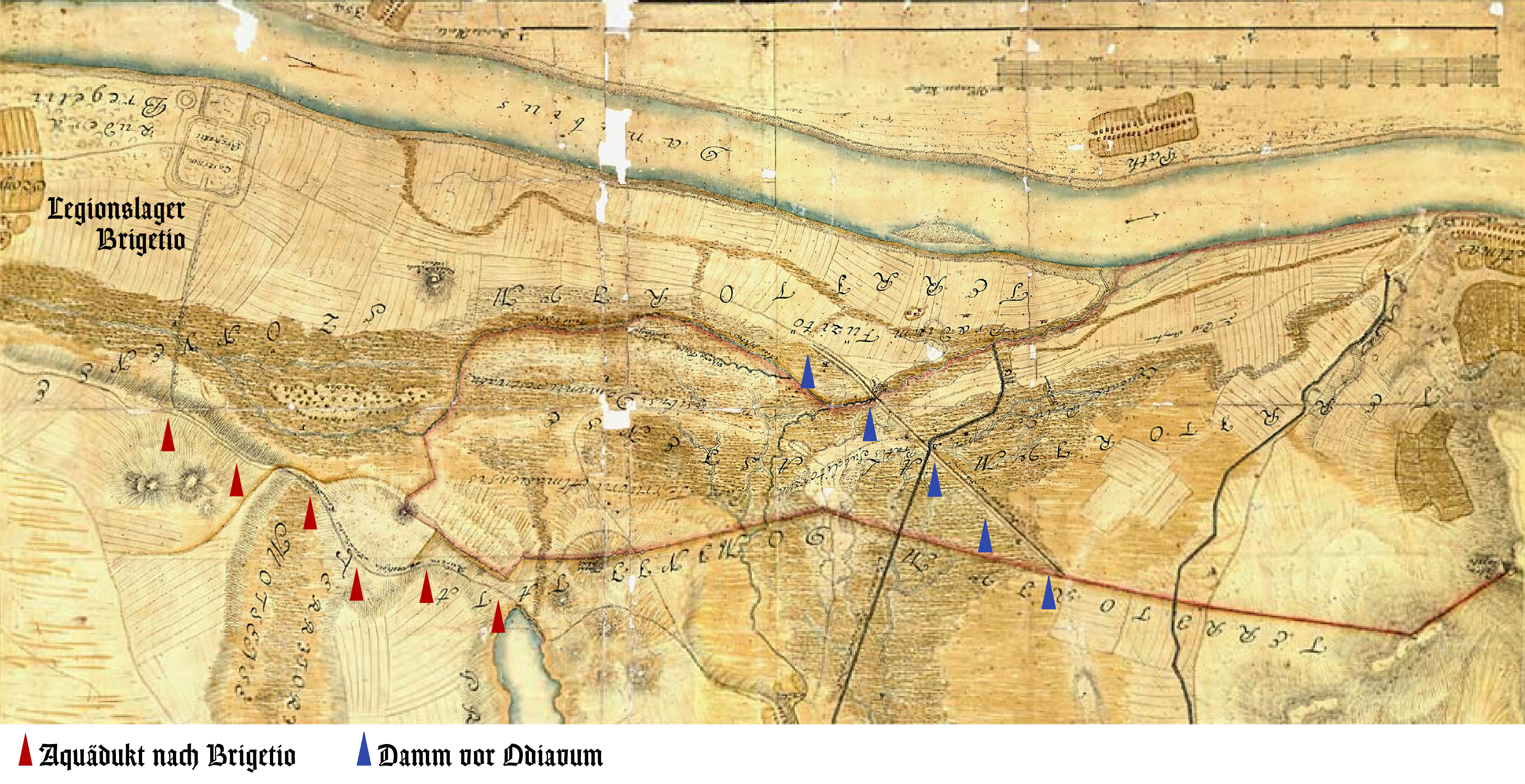 Zeichnung aus: Samuel Mikovíny: „Plan der zwischen Tata, Almás und Szőny liegenden Moresten. Den ursprung derselben so wohl, als auch mögliche ausdrückerung vorstellend.“